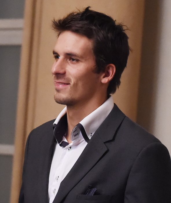 Matej Beňuš, december 2015